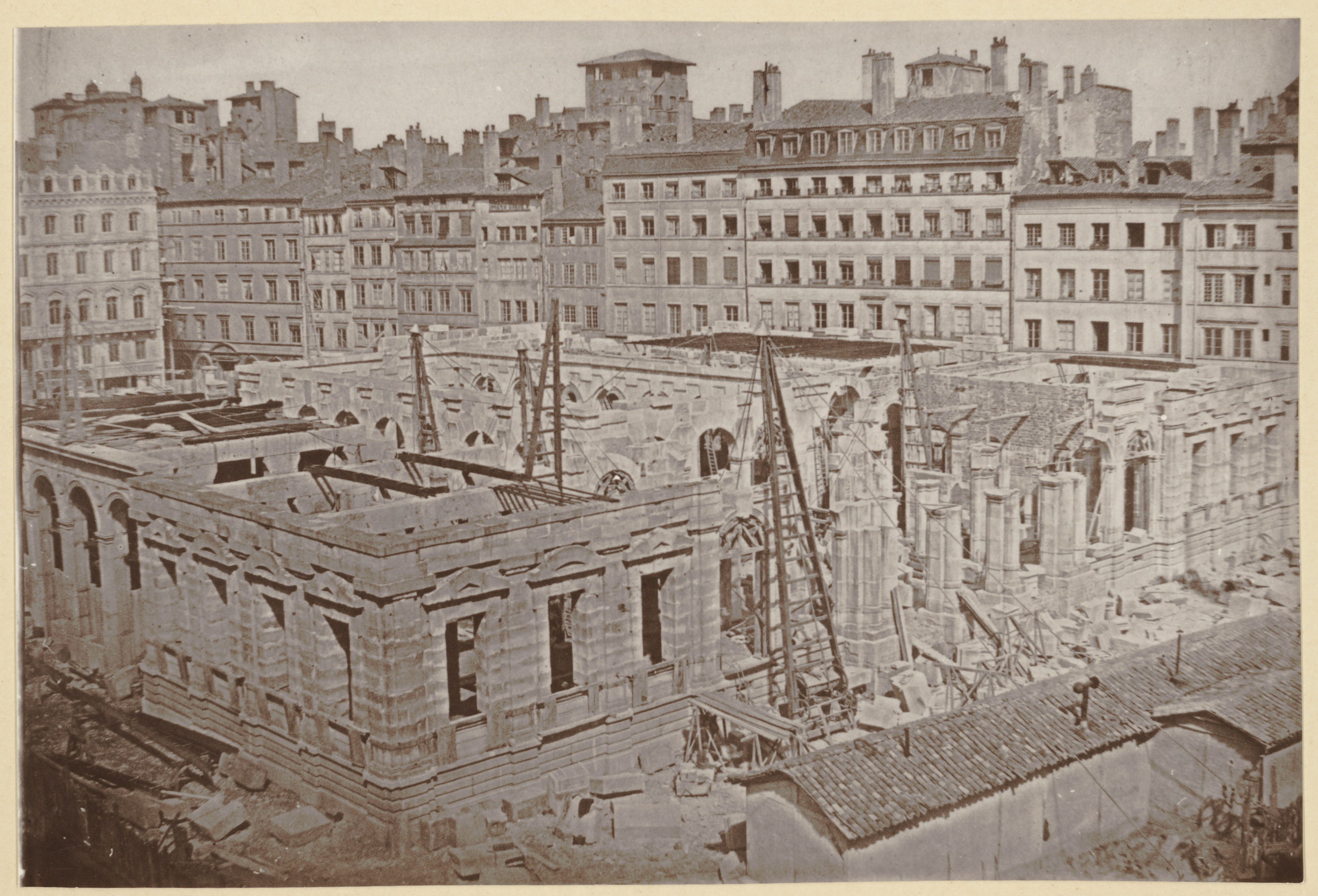 Grands travaux d'urbanisme du Second Empire ; ouverture de la rue Impériale et construction du palais du Commerce et de la Bourse